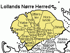 Lollands Nørre Herred Maribo Amt , Denmark. Map by Svend-Erik Christiansen, edited by user:Nico-dk .